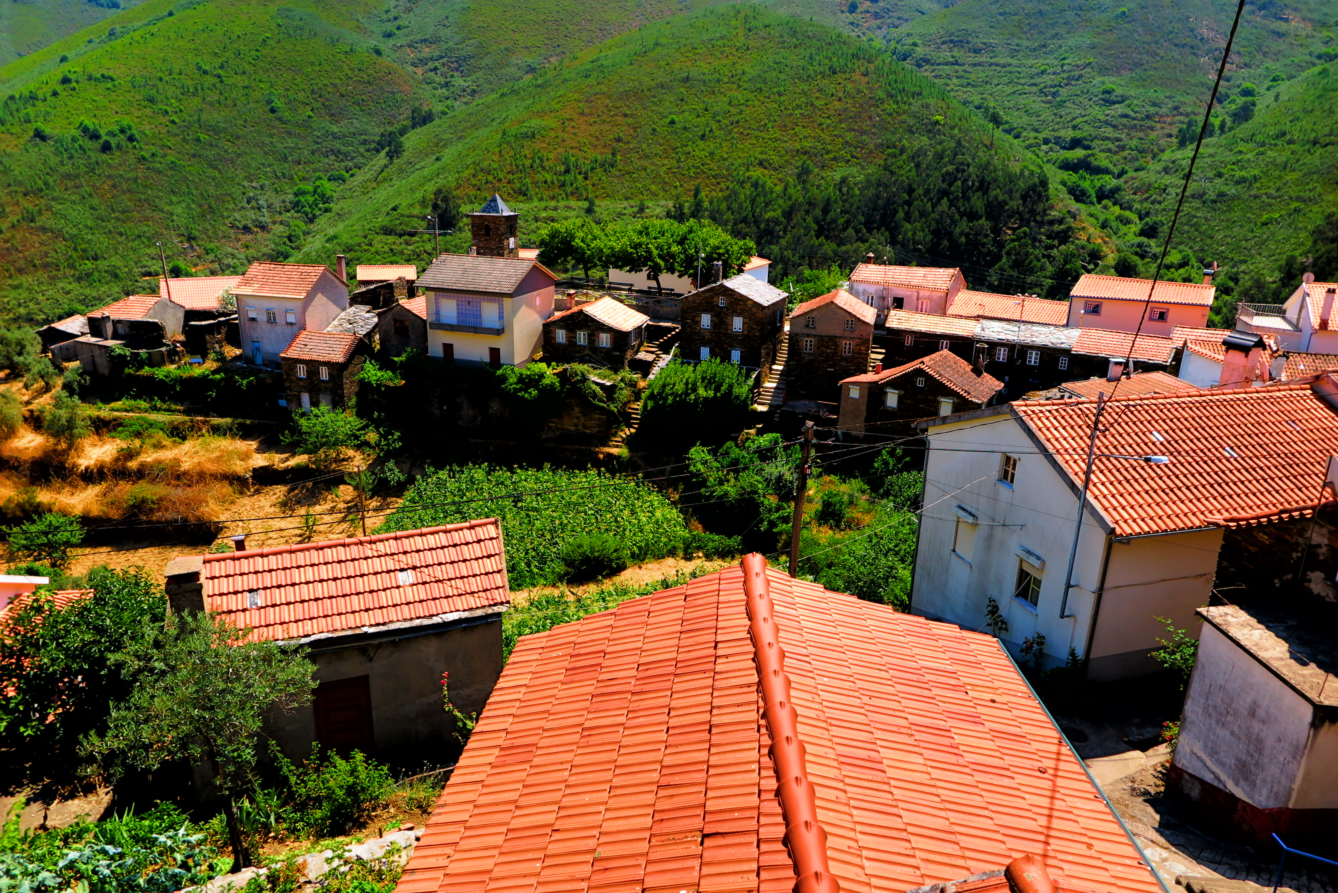 perspectiva sobre Soito da Ruiva